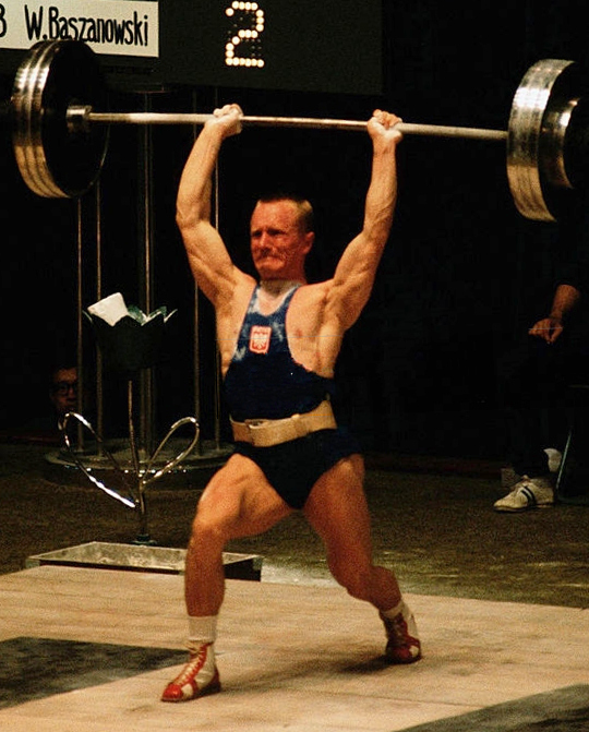 Waldemar Baszanowski, 1964 Olympics